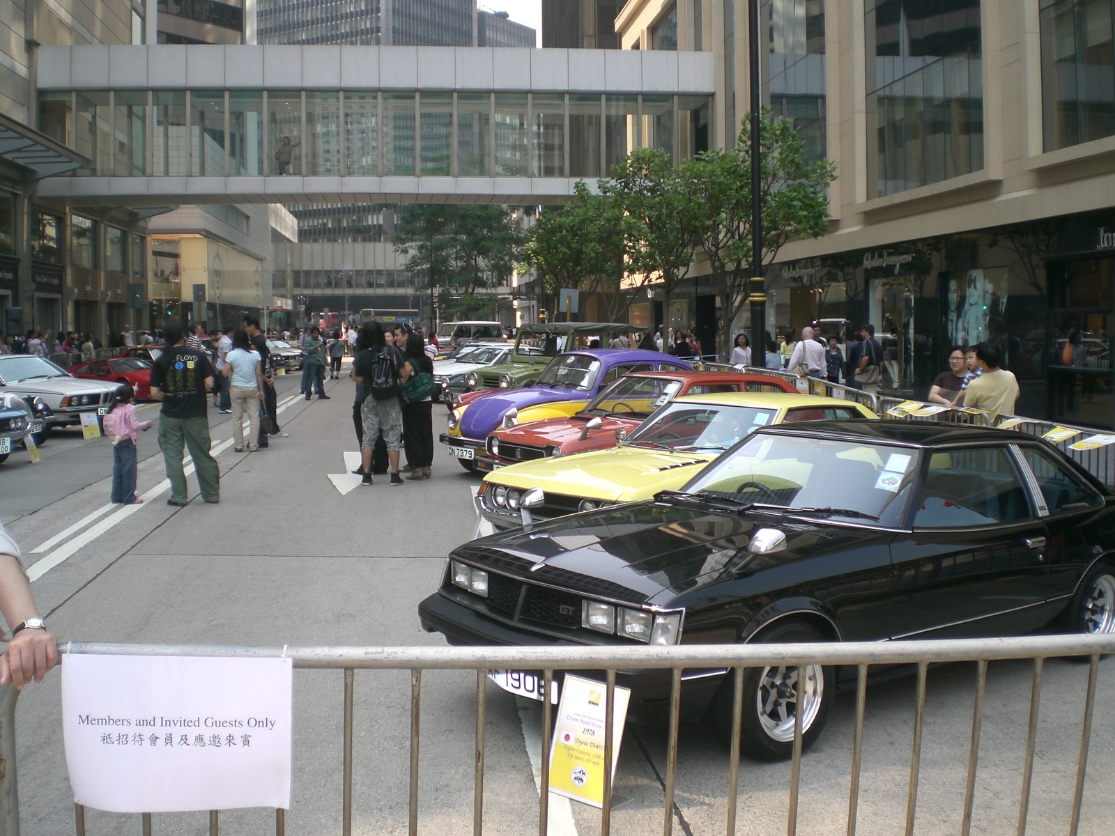 香港老爺車會 遮打道老爺車展覽2007年 此車會曾經是香港汽車會的屬會